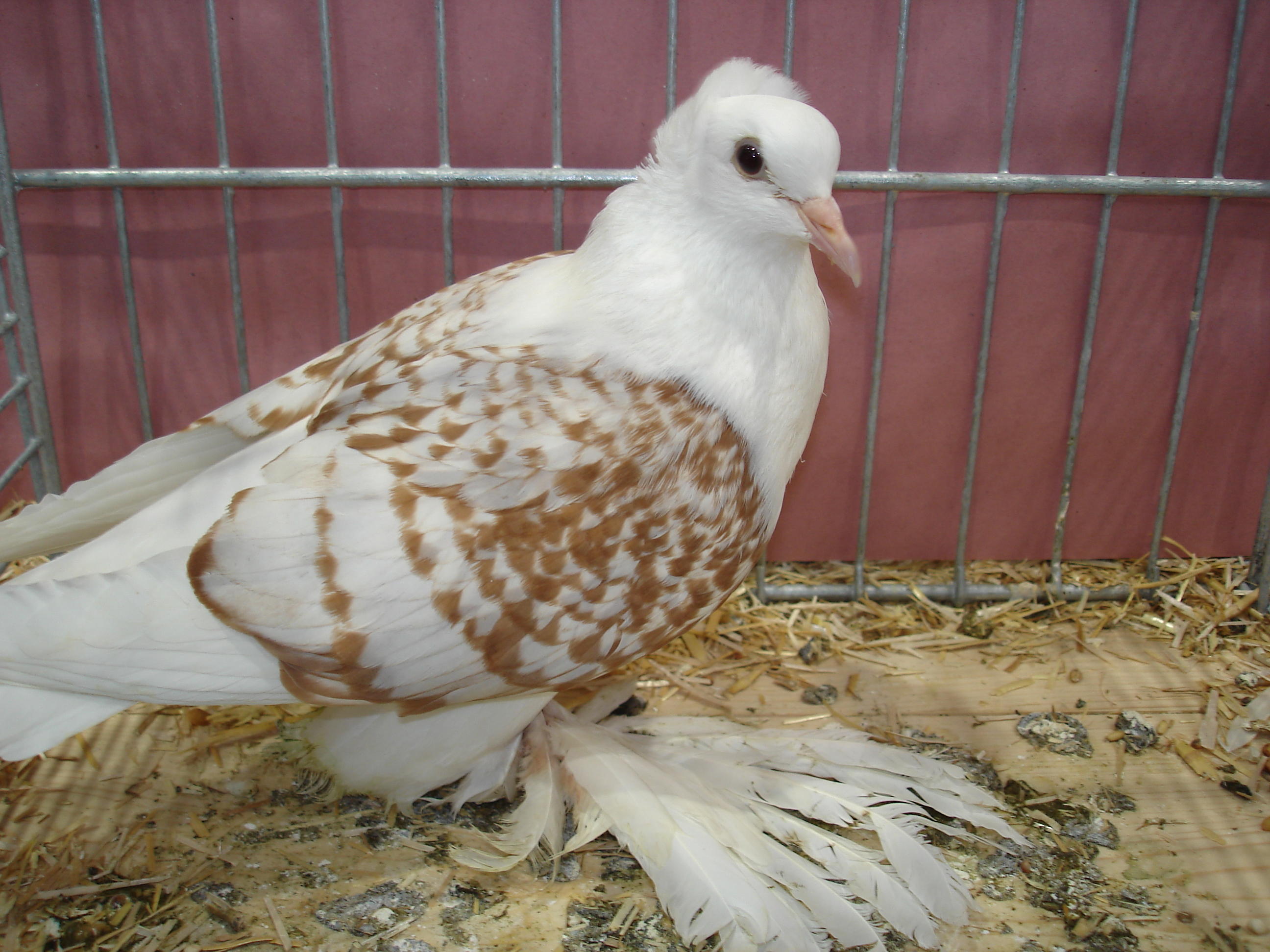 Zdjęcie gołębia rasy saksoński tarczowy